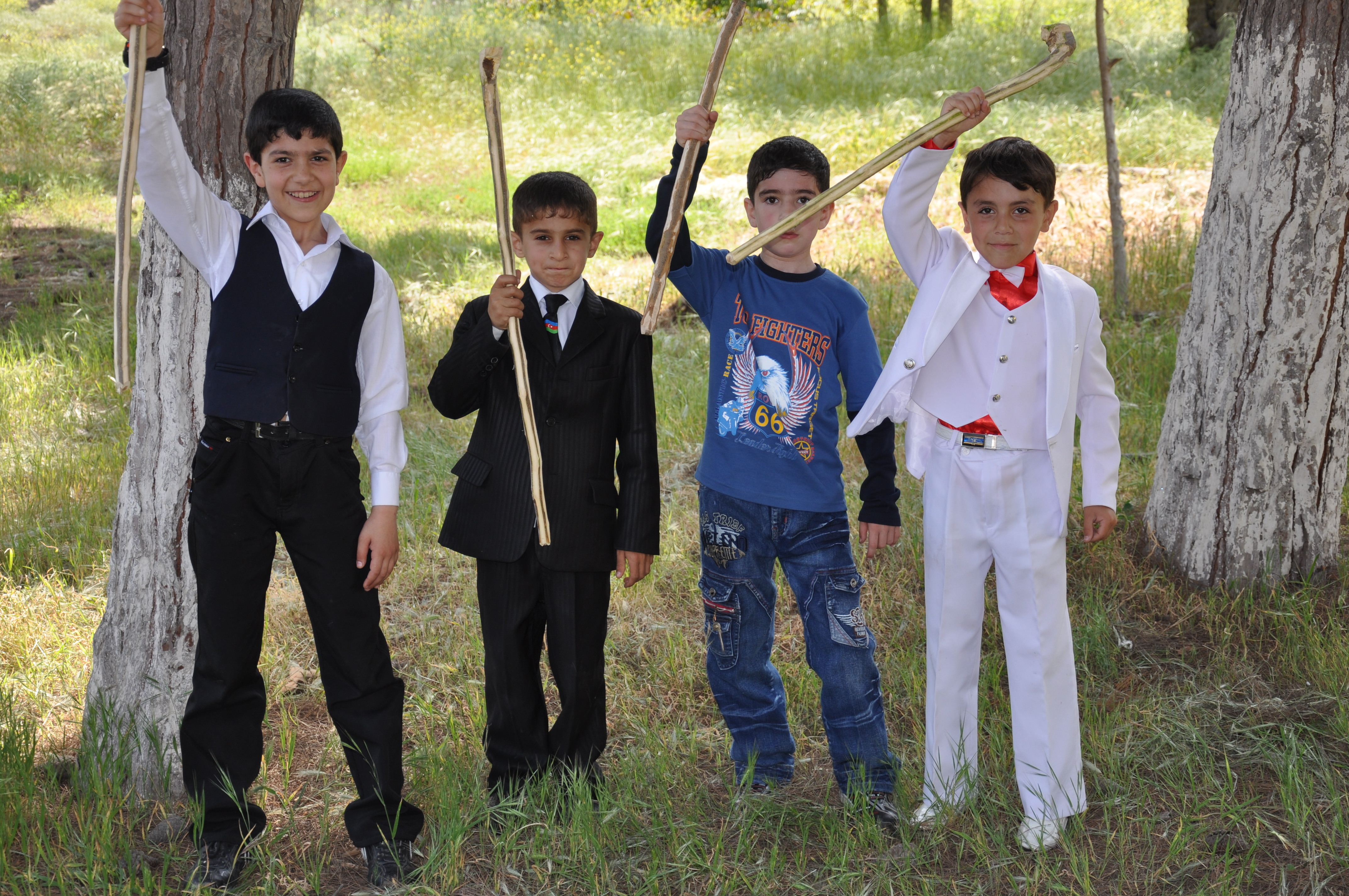 Çilingağac — Azərbaycanda əsasən yazqabağı, bayramqabağı günlərdə uşaq və gənclər arasında geniş şəkildə oynanılan ən qədim oyunlardan biri.